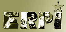 Bandera del ERPI